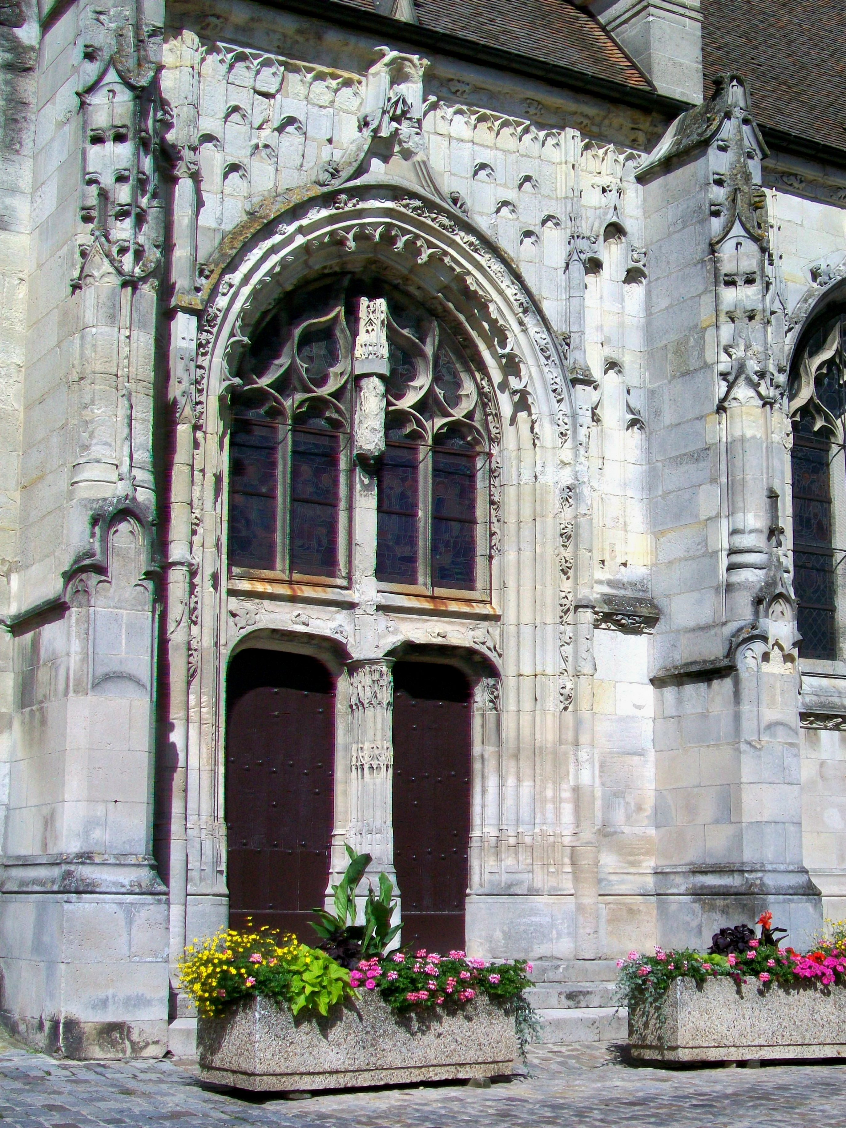 Le portail sud sur la rue des 2 églises.